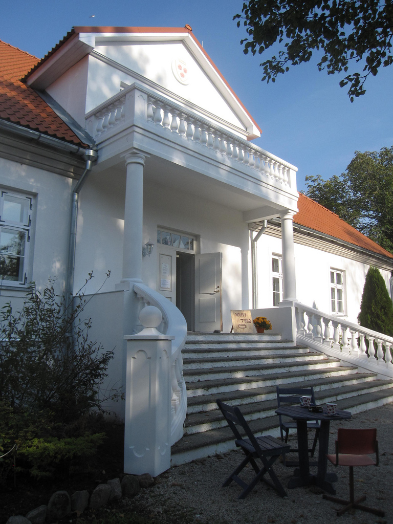 Saare (Lückholmi) mõis Noarootsis.